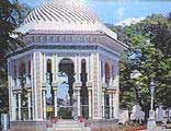 Erigida en el centro del parque más importante de la localidad, es orgullo de los manzanilleros y motivo de admiración para el visitante.